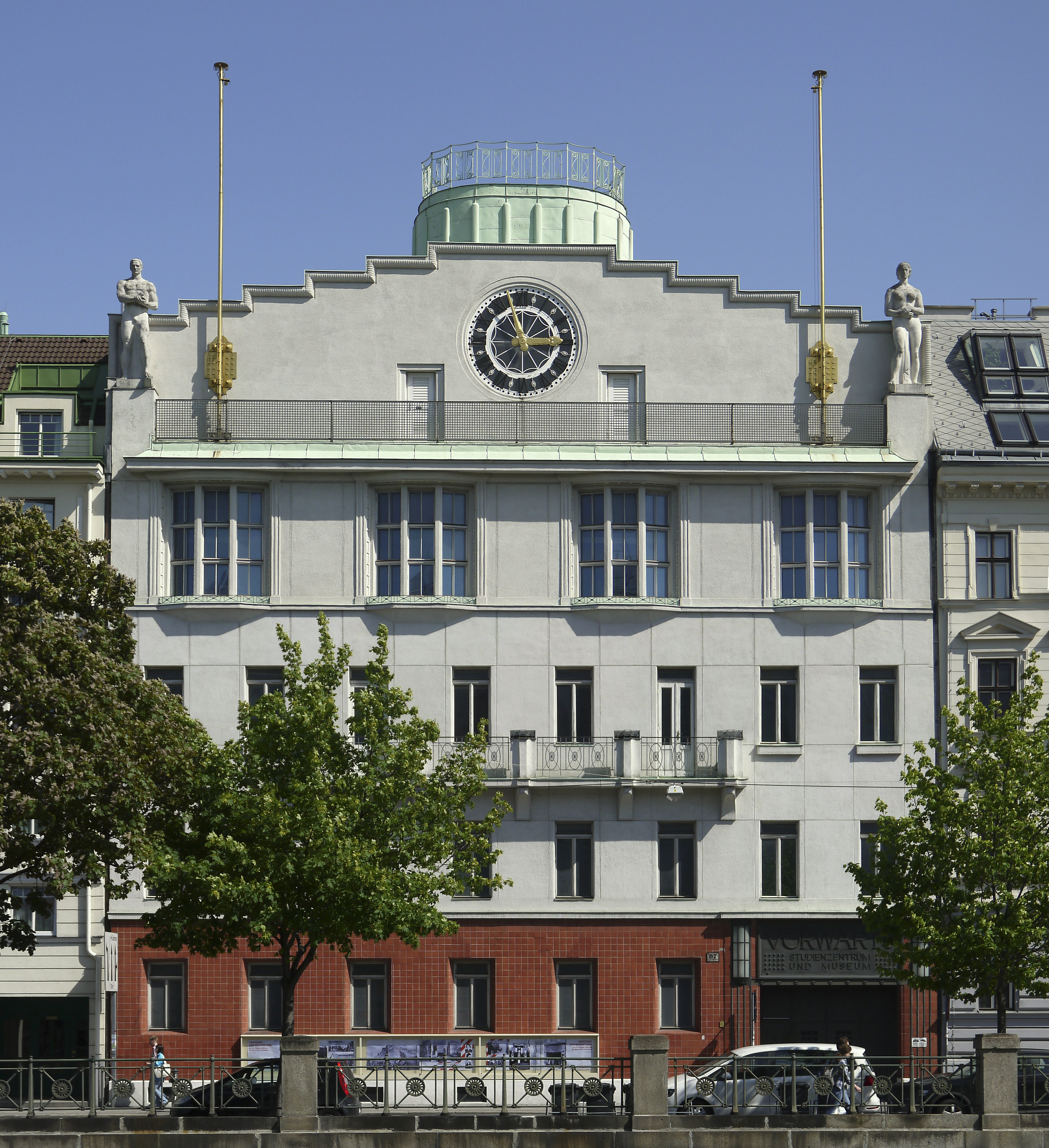 Verwaltungs-/Bürogebäude, Vorwärts-Verlag